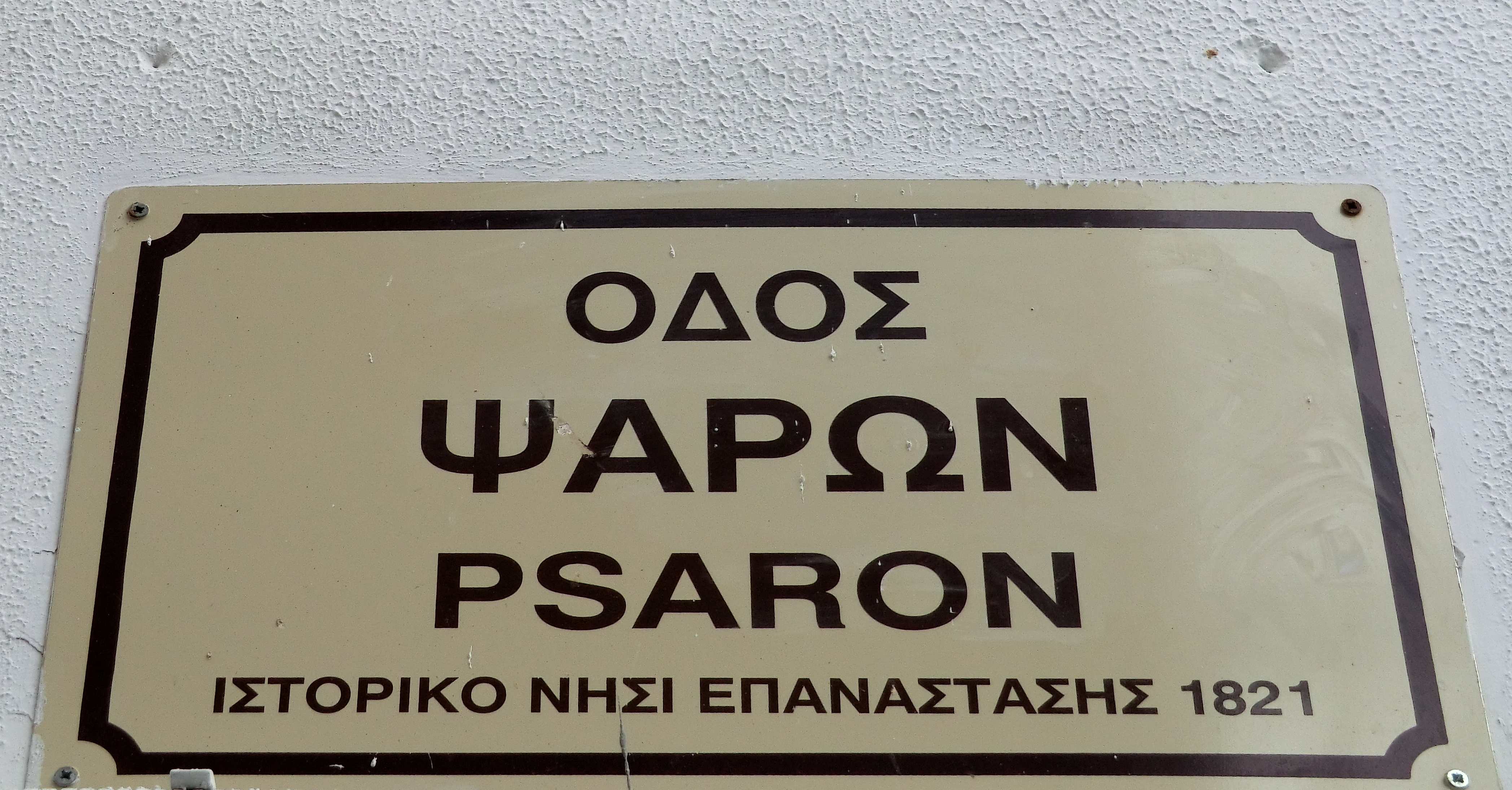 Plaque de la rue Psaron (Réthymnon).